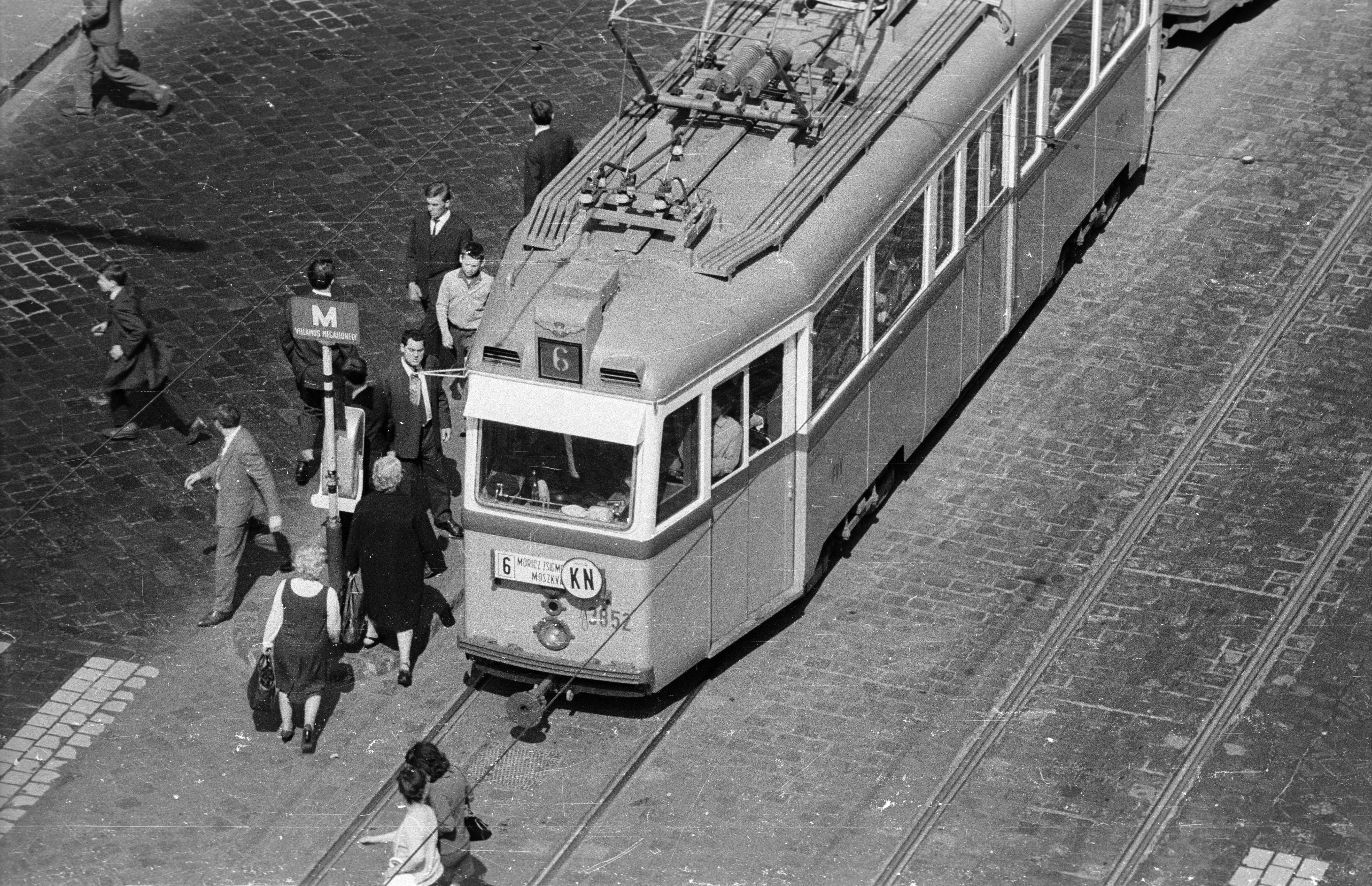 Margit körút (Mártírok útja), Keleti Károly utcai villamosmegálló. Location: Hungary, Budapest II. Tags: tram, tram stop, Ganz-brand, Ganz UV tramway, conductorless tram line, Budapest Title: Margit körút (Mártírok útja), Keleti Károly utcai villamosmegálló.